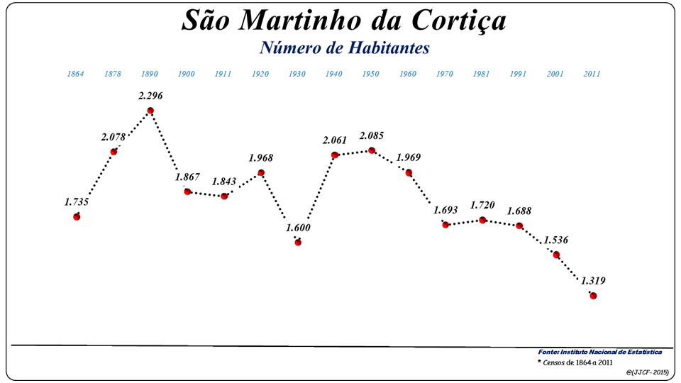 População